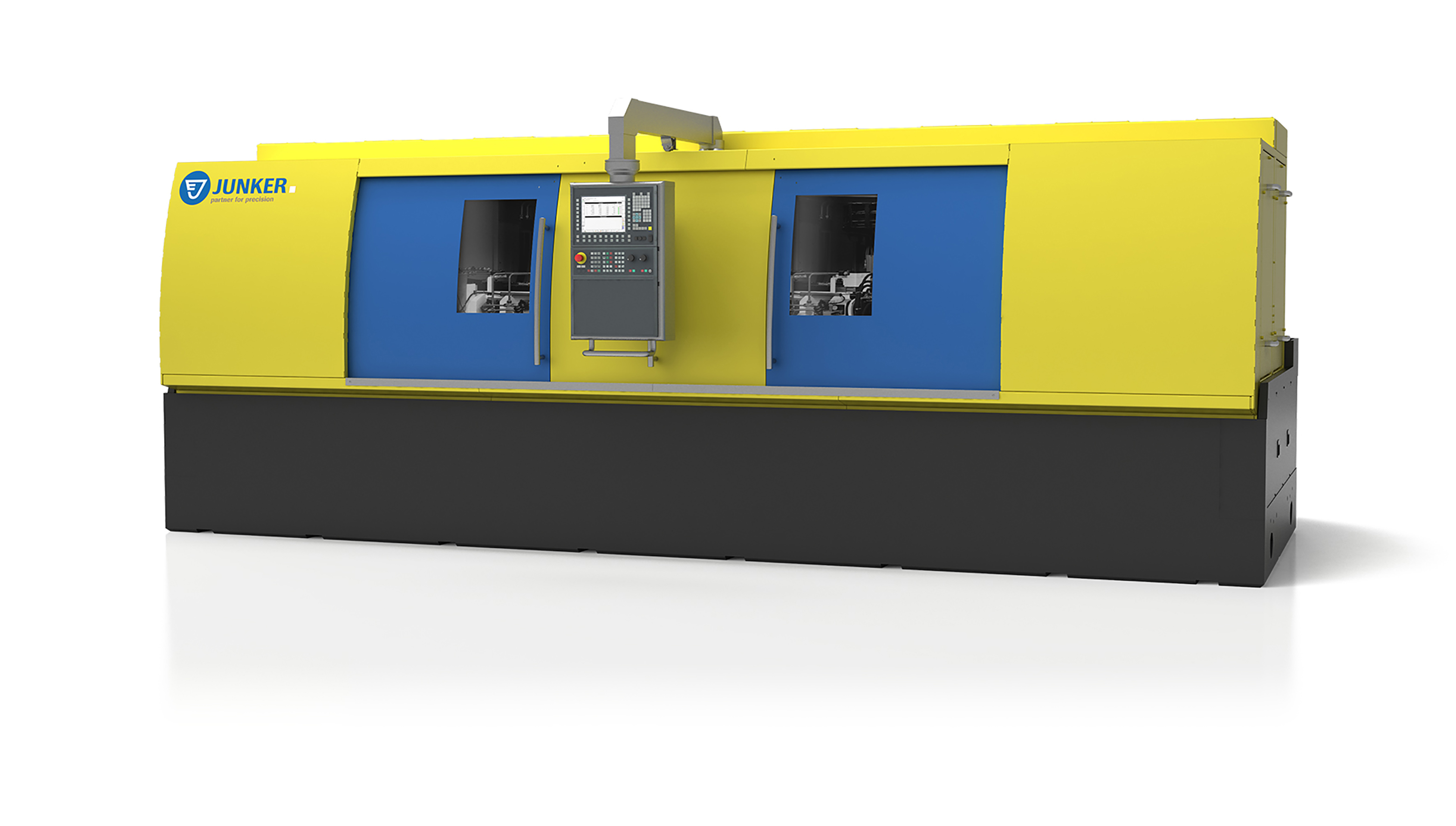 Schleifmaschine